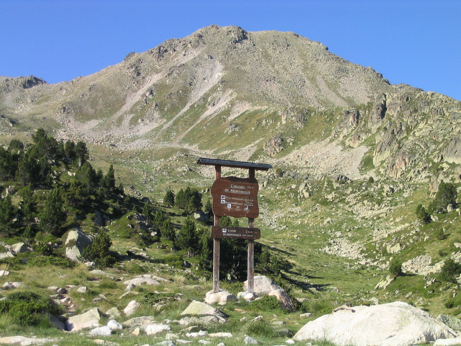 Foto del pico montmalús (Andorra)